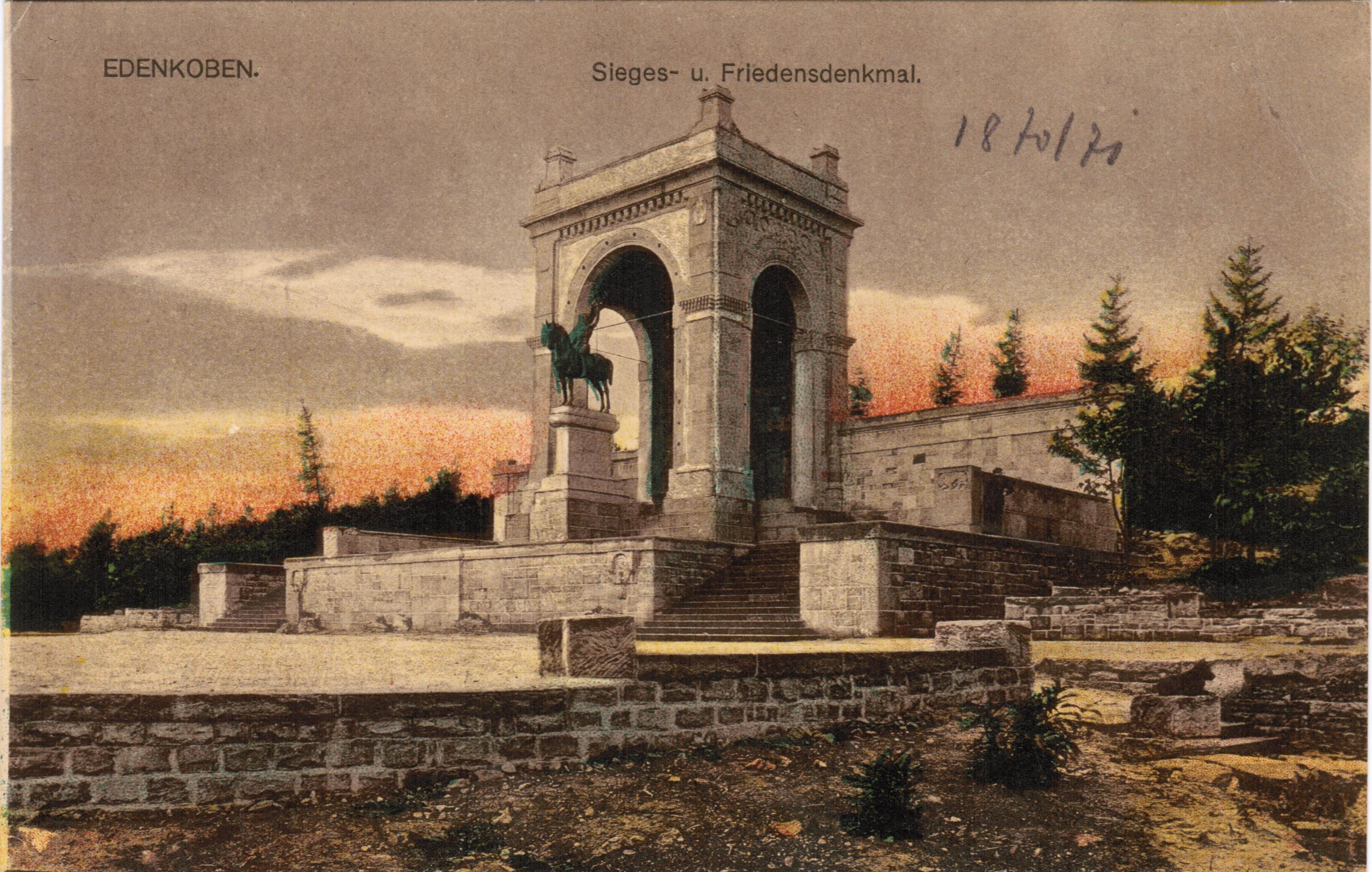 Postkarte aus dem Jahre 1918: Sieges- und Friedensdenkmal in Edenkoben